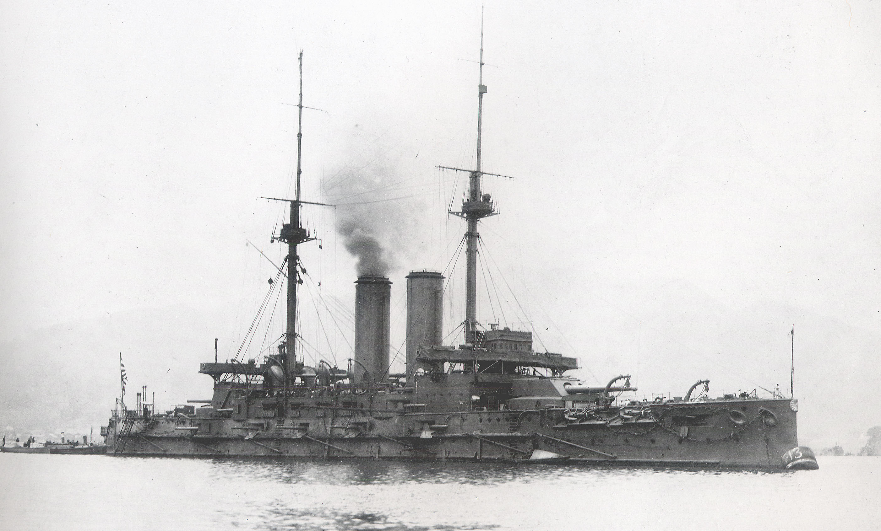 日本海軍戦艦敷島型「三笠 呉にて撮影されたもの。(Japanese battleship Mikasa in Kure)